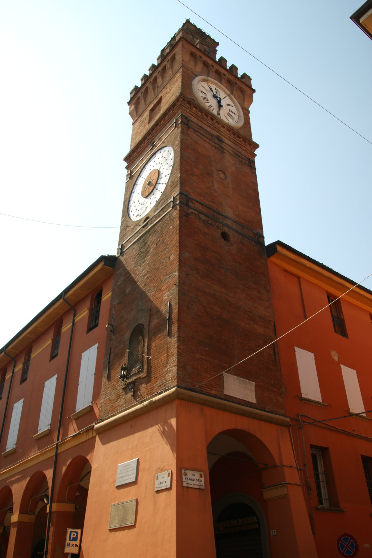 Torre dell’Orologio, Medicina